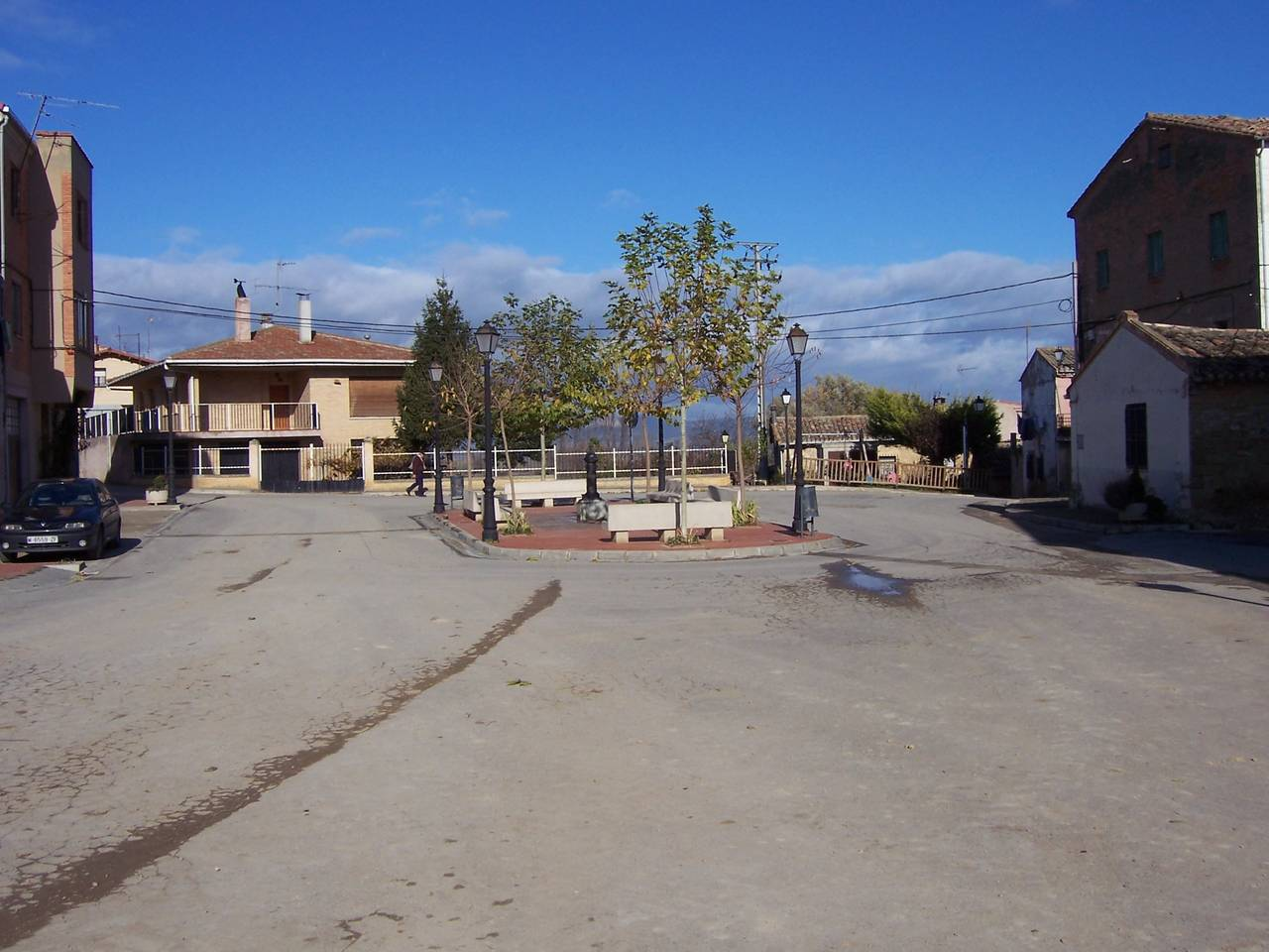 Plaza